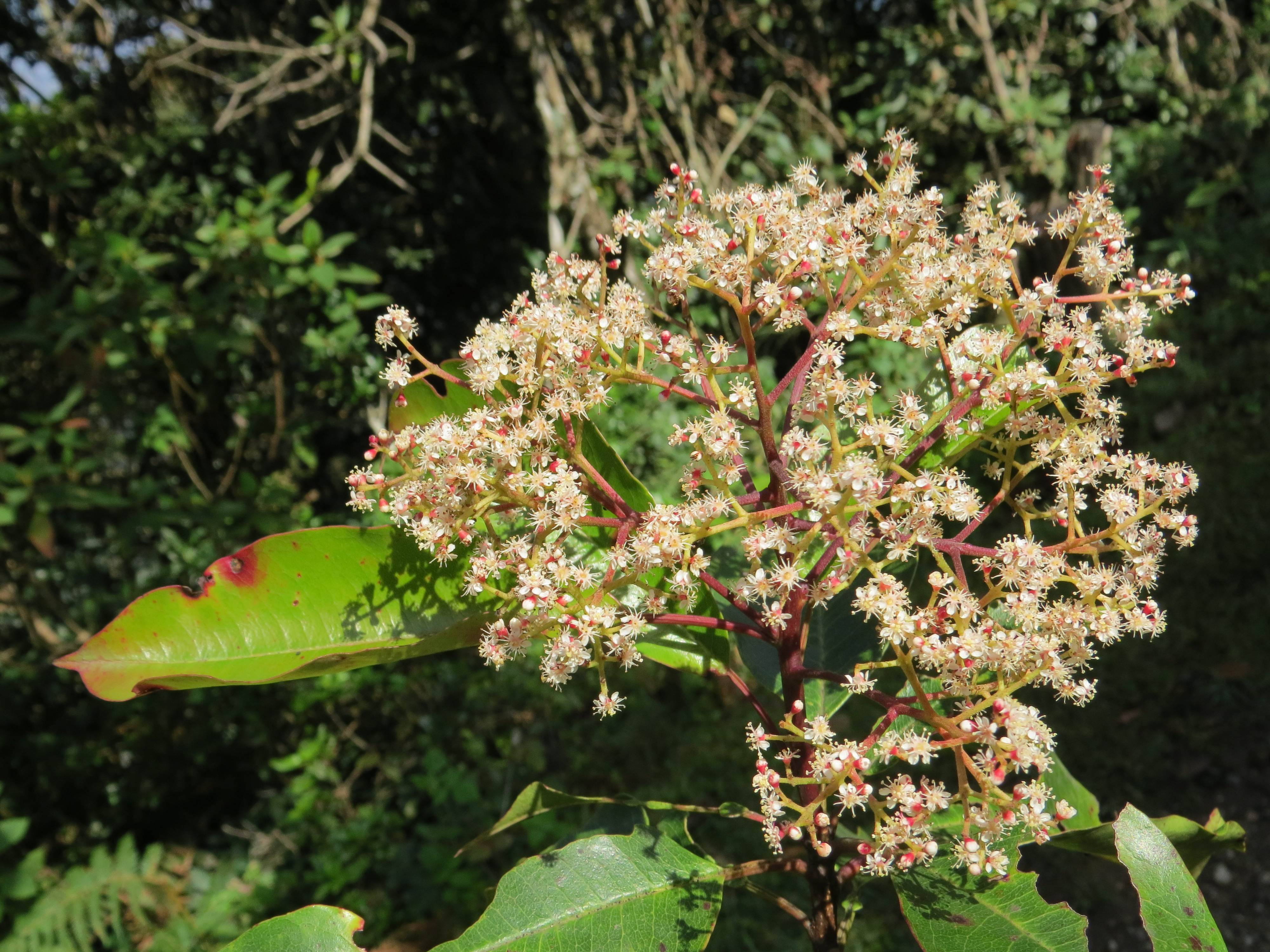 Photos taken at Mannavan Shola, Anamudi Shola National Park, Kerala during Munnar Butterfly Survey